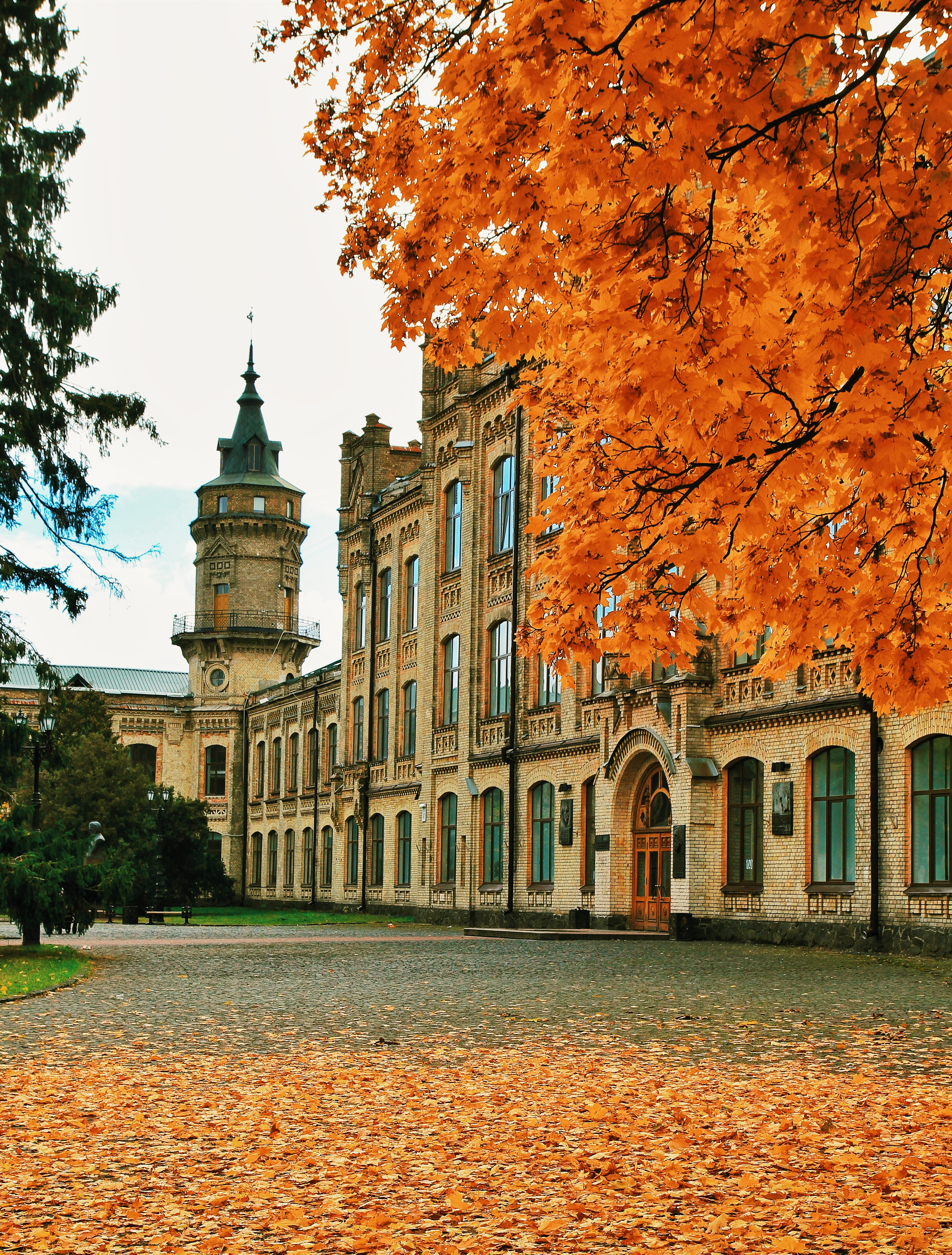 Комплекс споруд Київського політехнічного інституту, Київ, Перемоги просп., 37